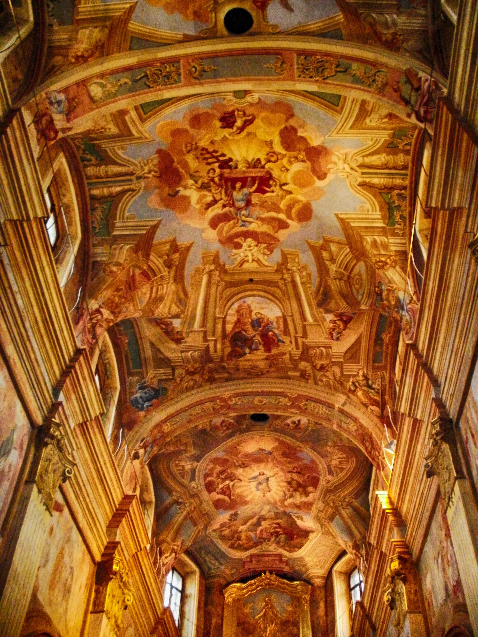 Беларуская (тарашкевіца): Комплекс былога кармеліцкага кляштара: касьцёл Св. Станіслава (Унебаўзяцьця Найсьвяцейшай Дзевы Марыі) з пляба- ніяй і росьпісам у інтэр’еры касьцёла; тэрыторыя комплексу: з паўднёвага боку абмежаваная існуючай падпорнай сьцяной, якая ўключае праезд ад чырвонай лініі забудовы да перадкасьцельнай плошчы, і далей на ўсход ад падпорнай сьцяны перадкасьцельнай плошчы ўмоўнай лініяй, паралельнай вул. Камса- мольскай (55 м на поўнач ад чырвонай лініі забудовы вул. Камсамольскай); з усходняга боку абмежаваная ўмоўнай лініяй, паралельнай вул. Ленінскай (50,5 м на захад ад чырвонай лініі забудовы, арыентаванай па дамах № 16, 20 па вул. Ленінскай); з паўночнага боку абмежаваная ўмоўнай лініяй, паралельнай падпорнай сьцяне (46,2 м на поўдзень ад чырвонай лініі забудовы (ад дома К. Лібкнехта, 7); з заходняга боку абмежаваная ўмоўнай лініяй у створы існуючай падпорнай сьцяны. г. Магілёў This is a photo of Belarusian heritage monument. Reference number: 512Г000020 ( WLM)